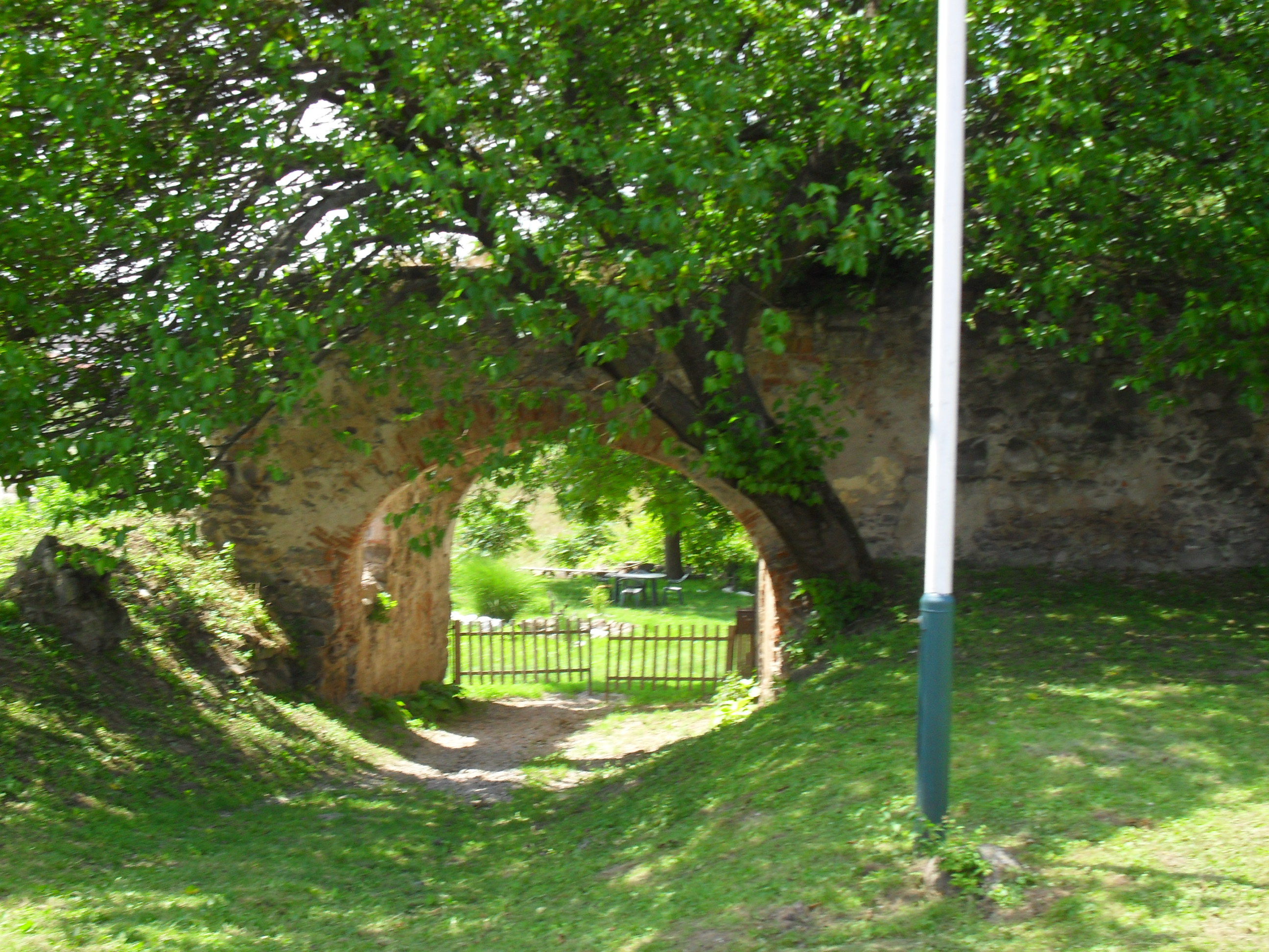 Bodrogszerdahely - kastélypark